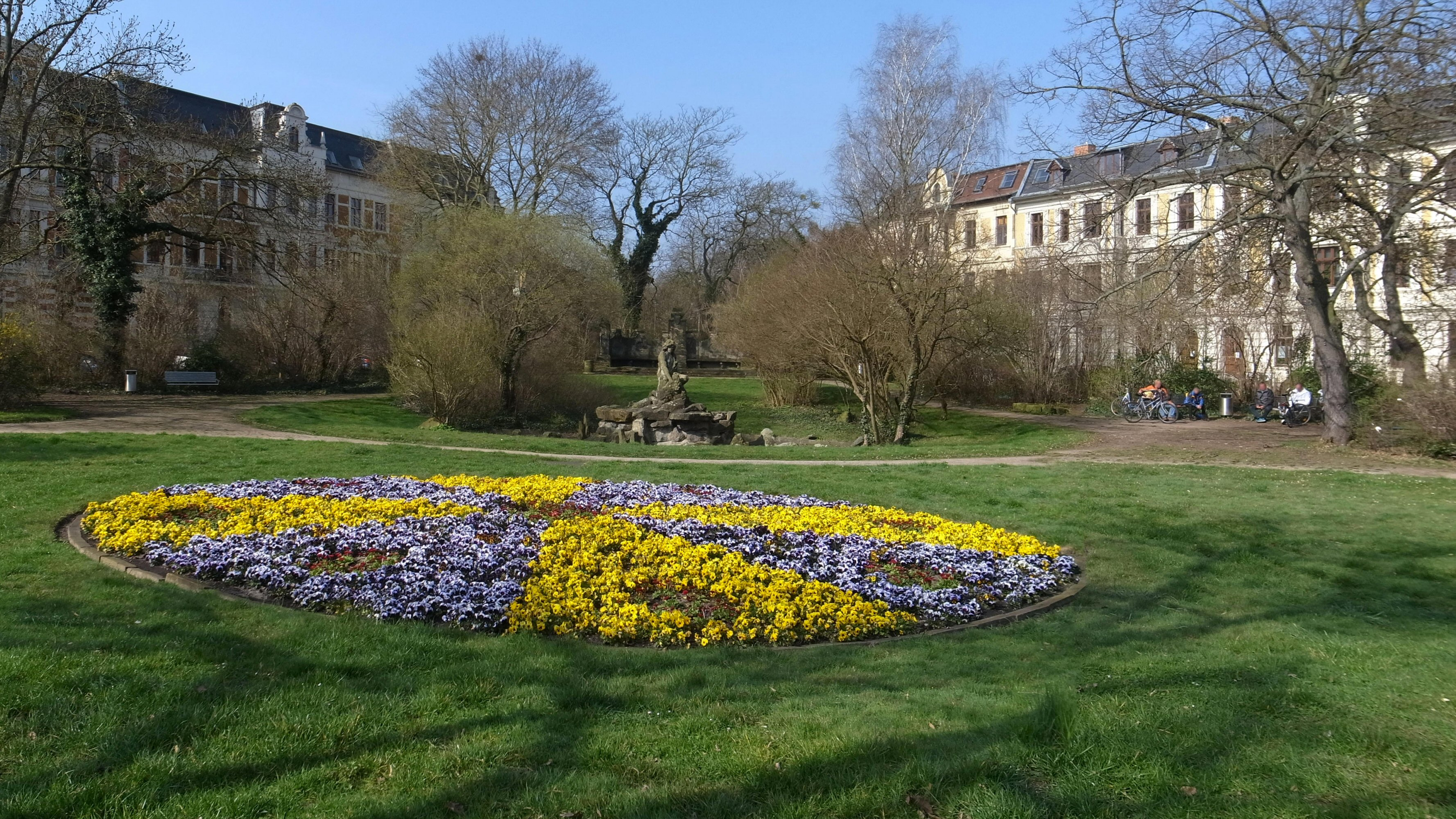 Dessau-Roßlau, Funkplatz mit Biberbrunnen und Denkmal für den Oberbürgermeister Dr. Friedrich Funk (* 28.05.1847; † 06.10.1897) (Kulturdenkmal im Denkmalverzeichniss Sachsen-Anhalt, Erfassungsnummer: 094 40228 000 000 000 000 [1])